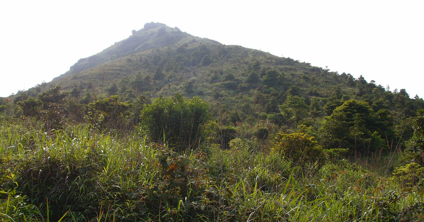 中文（香港）: 水牛山，攝於打瀉油坳